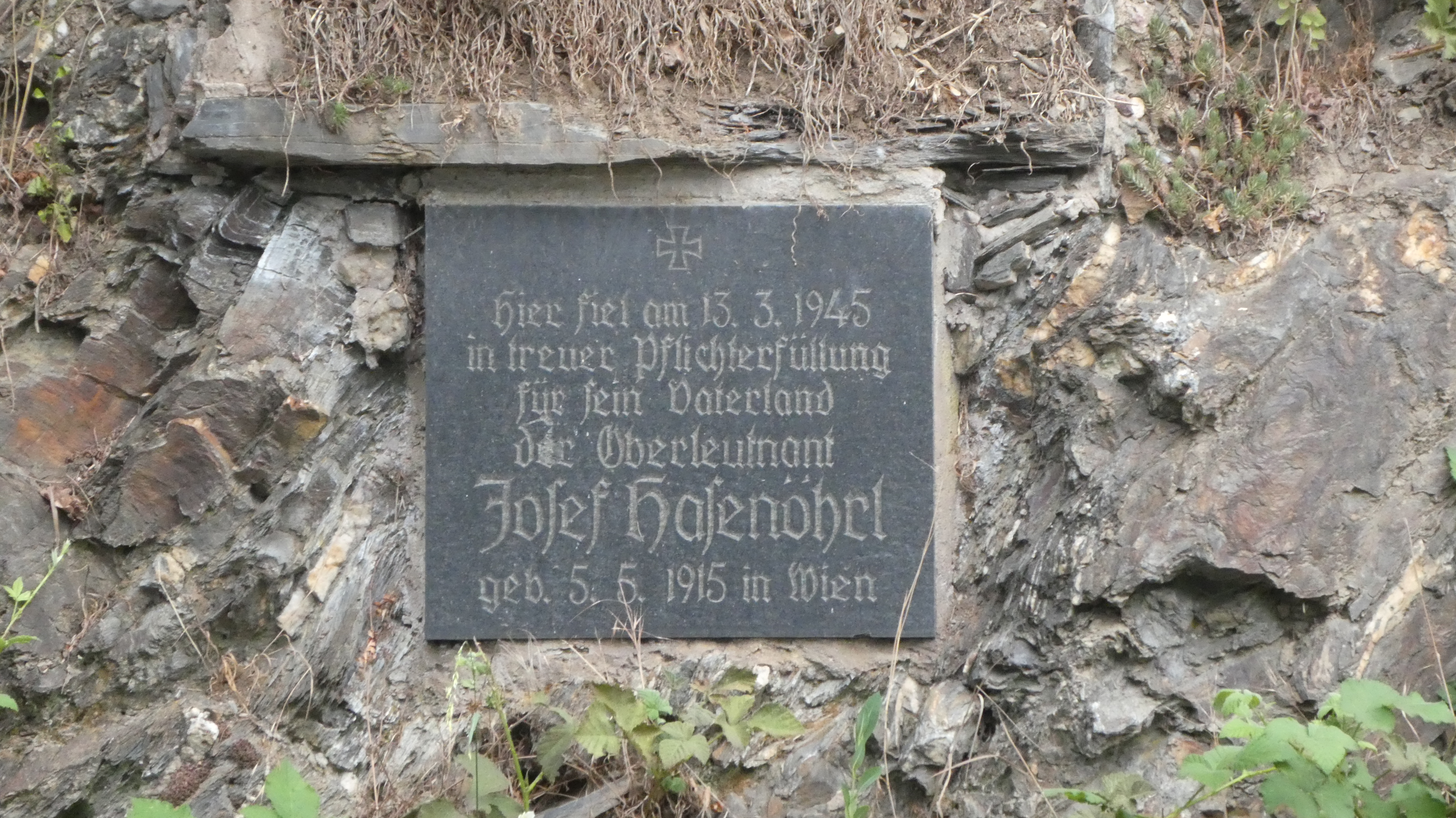 Hier fiel am 13.3.1945 in treuer Pflichterfüllung für sein Vaterland der Oberleutnant Josef Hasenröhrl geb 5.5.1915 in Wien